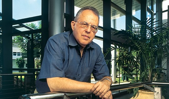 פרופסור לפיזיקה חיים הררי